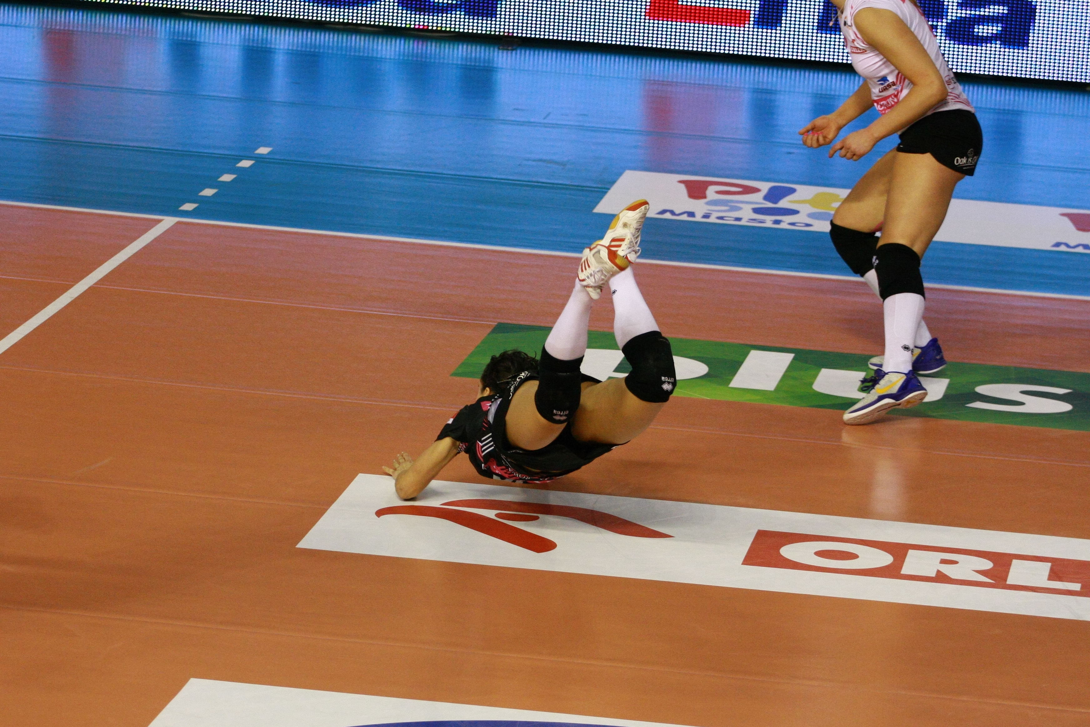 Atom Trefl Sopot Bank BPS Muszynianka Fakro Muszyna Tauron MKS Dąbrowa Górnicza Impel Gwardia Wrocław